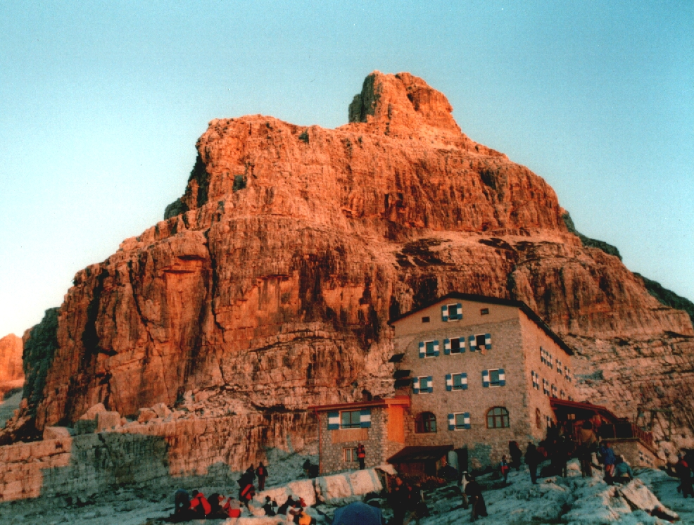 Alba al Rifugio Pedrotti nelle Dolomiti di Brenta